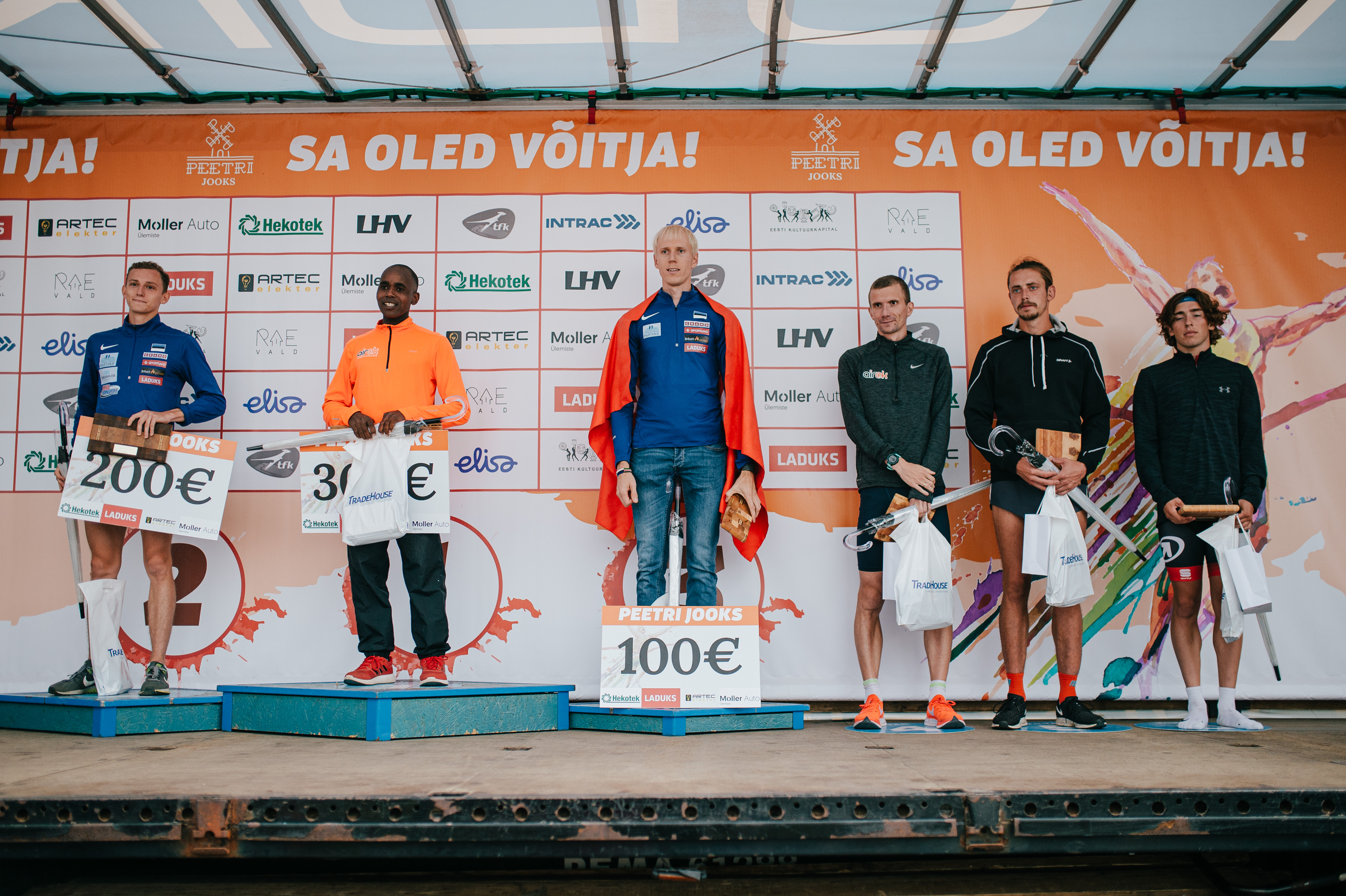 Põhijooks